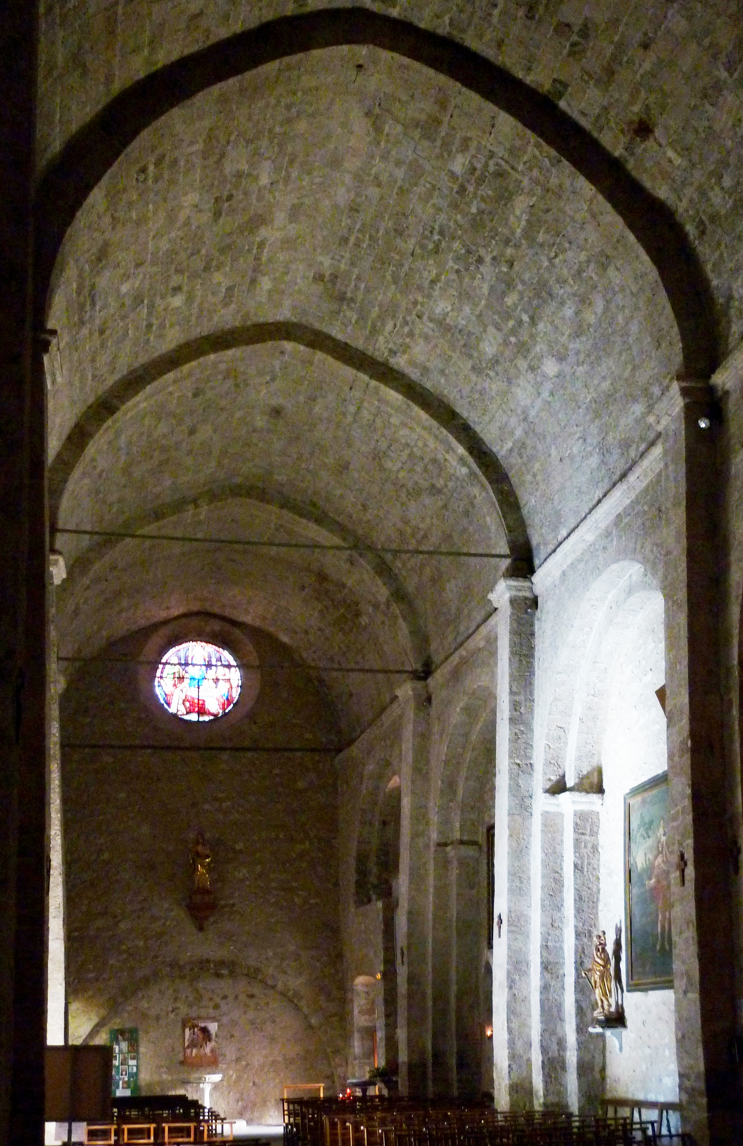 Katholische Pfarrkirche Notre-Dame-de-l'Assomption in Moustiers-Sainte-Marie, einer Gemeinde im Département Alpes-de-Haute-Provence in der französischen Region Provence-Alpes-Côte d'Azur; Kirchenschiff nach Westen, Spitztonne mit Gurtbögen, Okulus in der Westwand